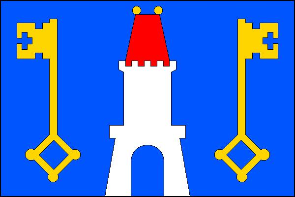 Vlajka obce Načeradec